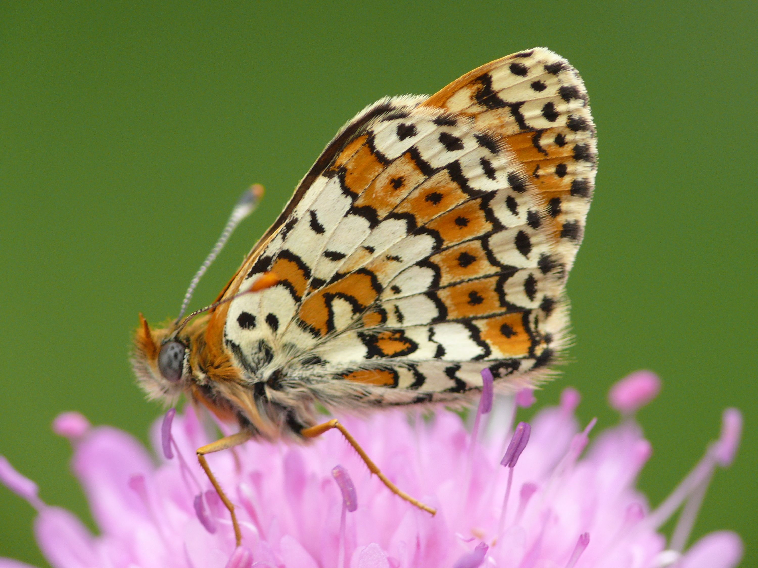 Melitaea cinxia